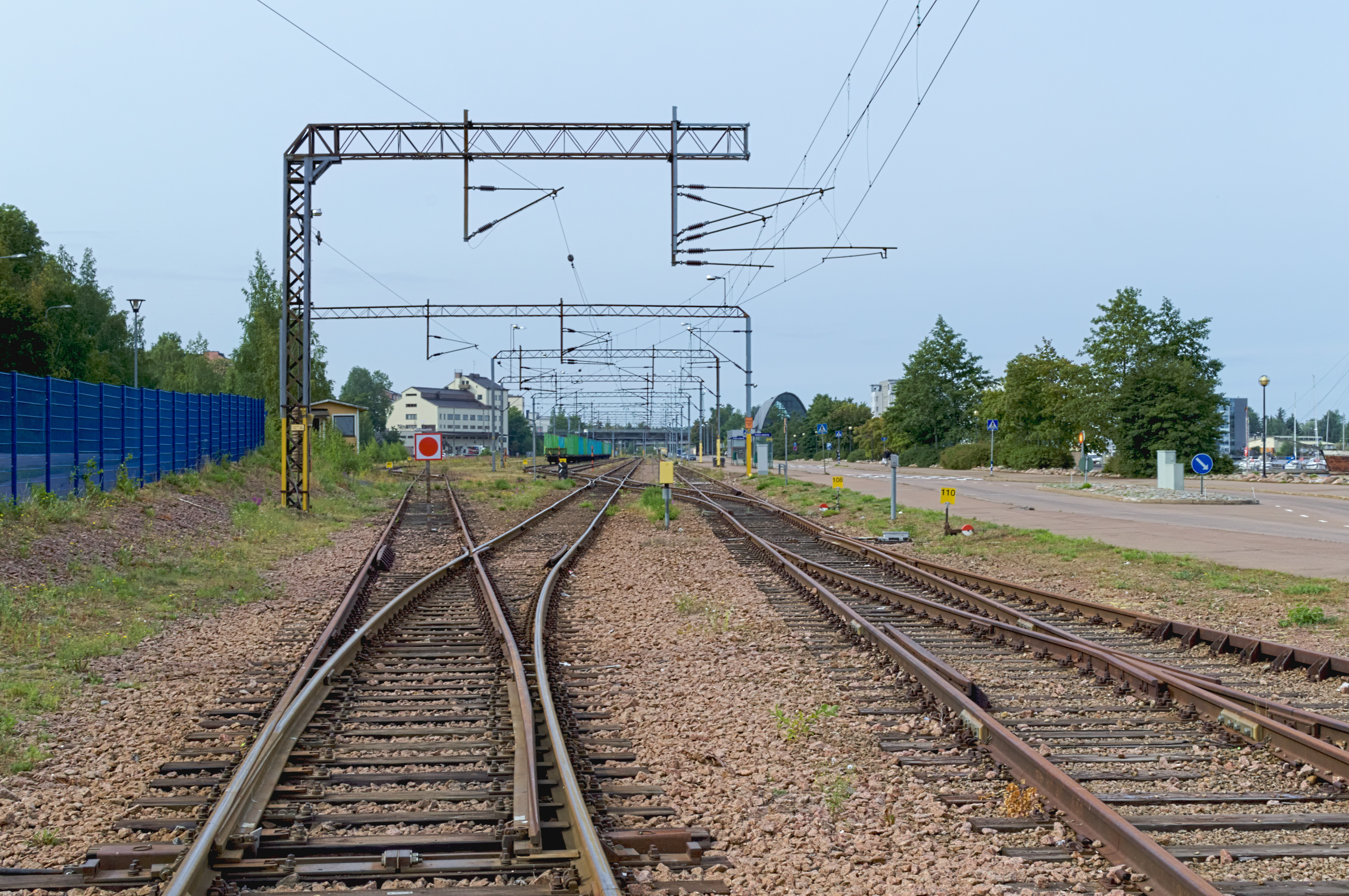 Kotkan rataa sen päätepisteessä Kotkan satamassa